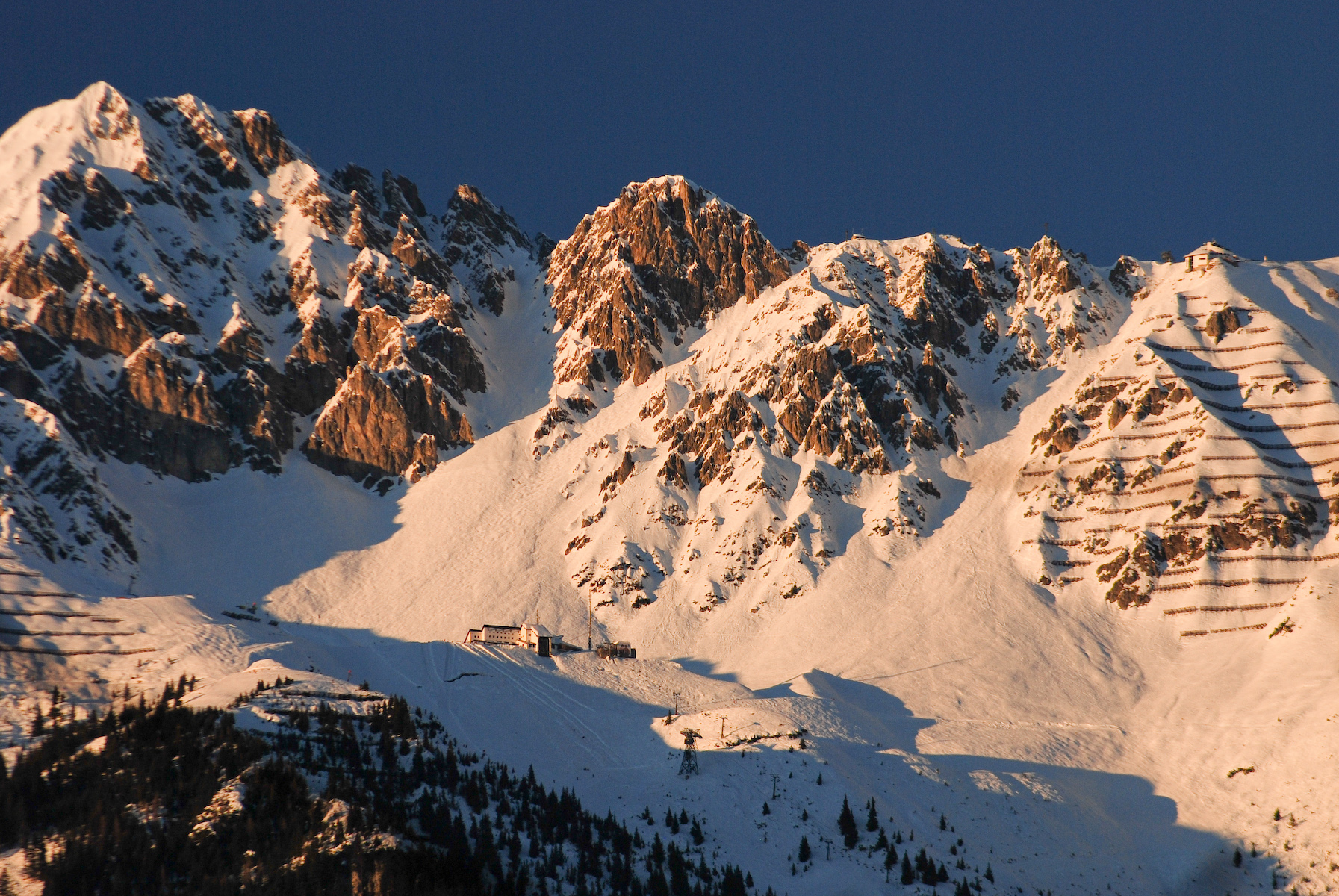 Seegrube und Hafelekar, Ansicht von Wilten